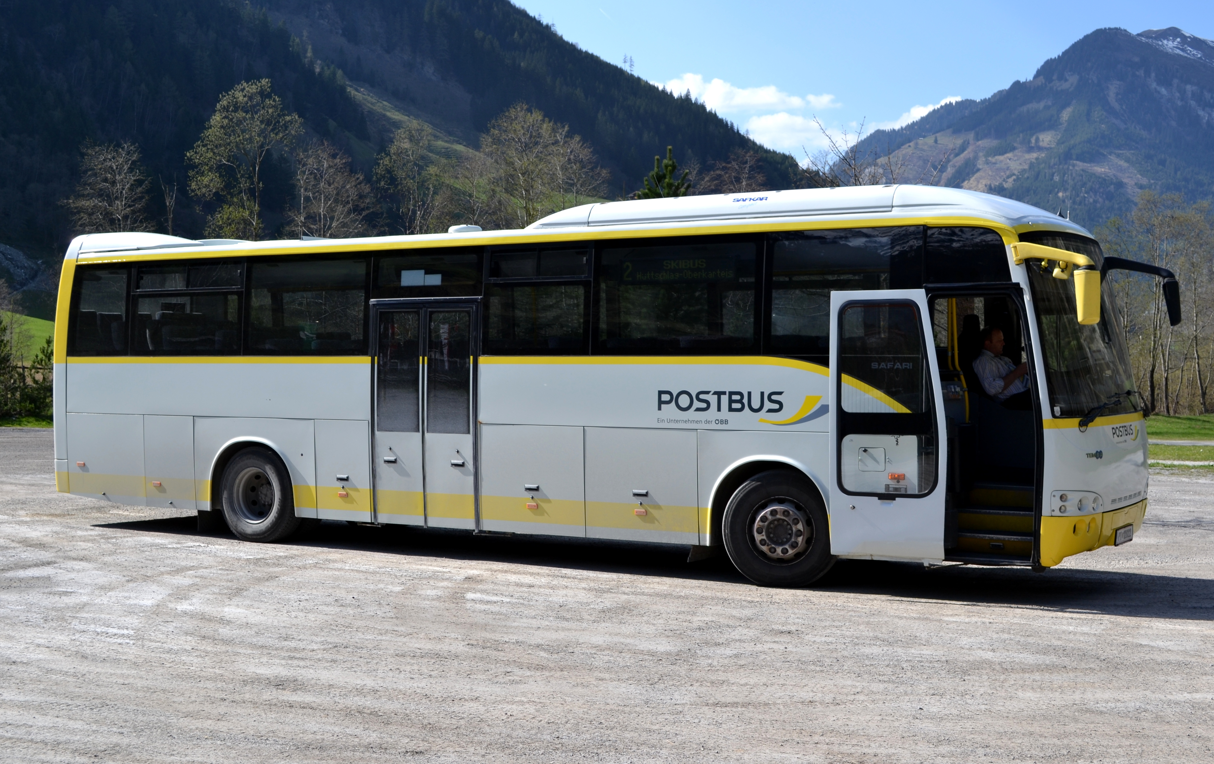 Ein Temsa Safari der ÖBB Postbus GmbH im Großarltal.